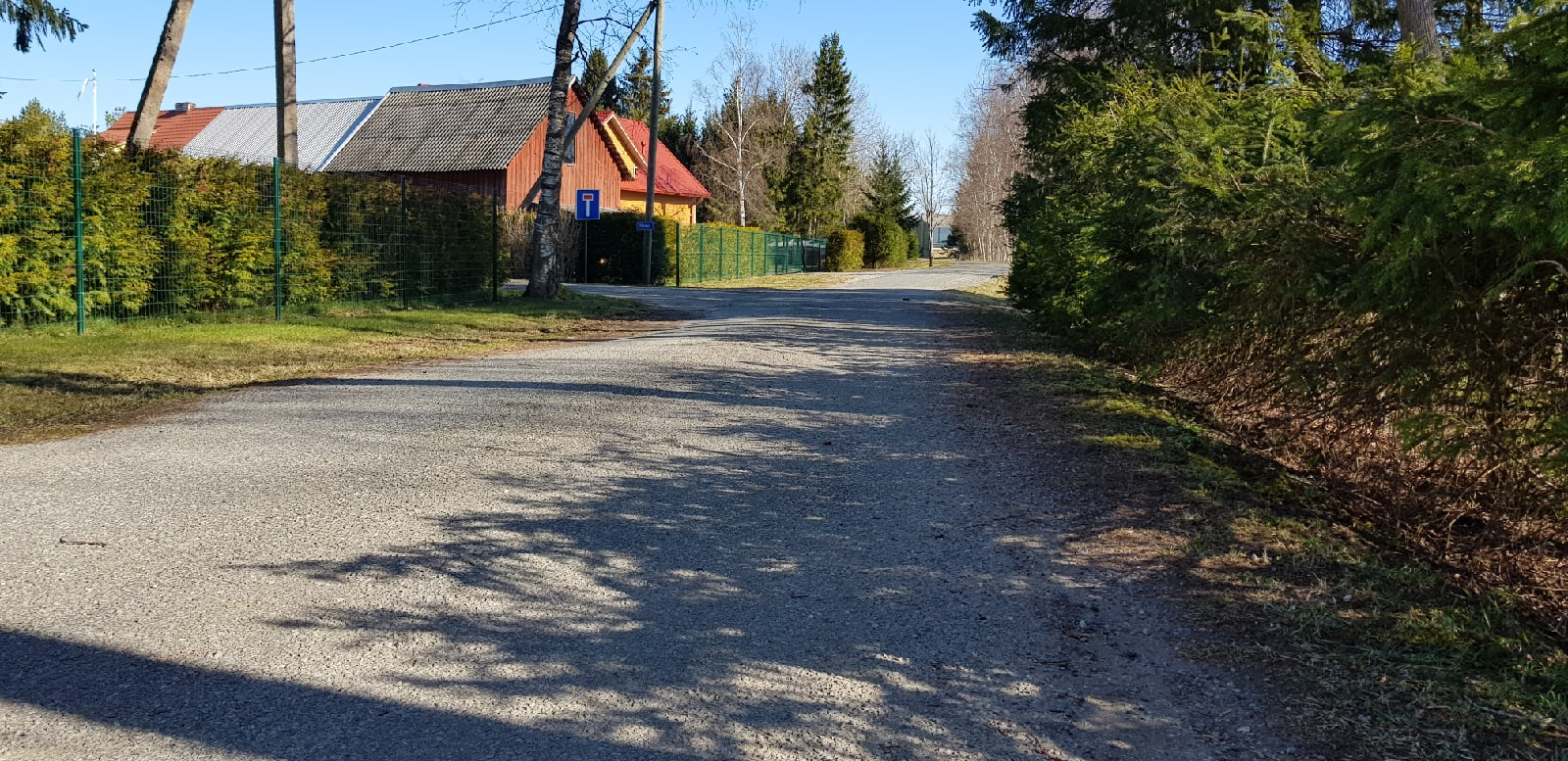 Vaade Heina teele (vasakul) Ööbiku teelt